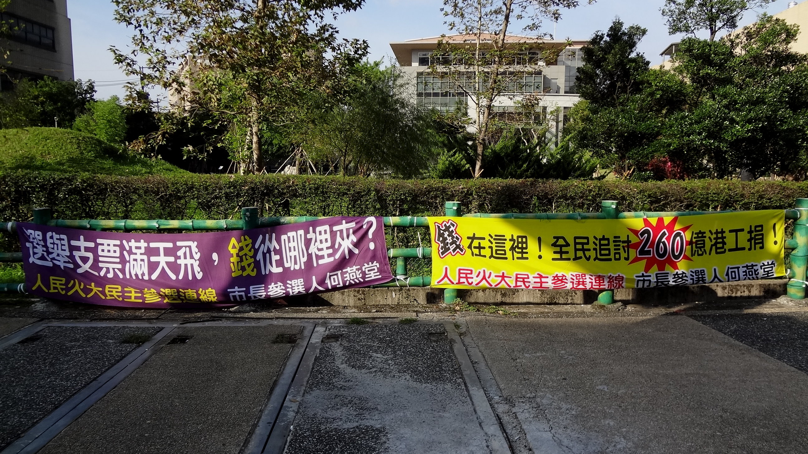 2014年基隆市市長選舉，人民火大民主參選連線市長參選人何燕堂的廣告布條，懸掛於基隆市七堵區工建路。